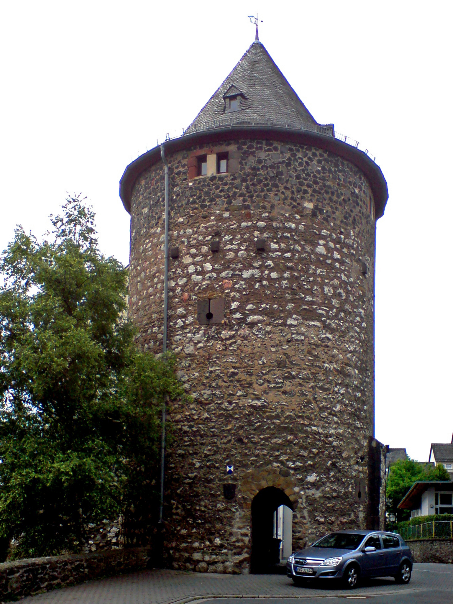 Der Säuturm in Wetzlar (Hessen), Deutschland (letzter erhaltener Turm der mittelalterlichen Stadtmauer)